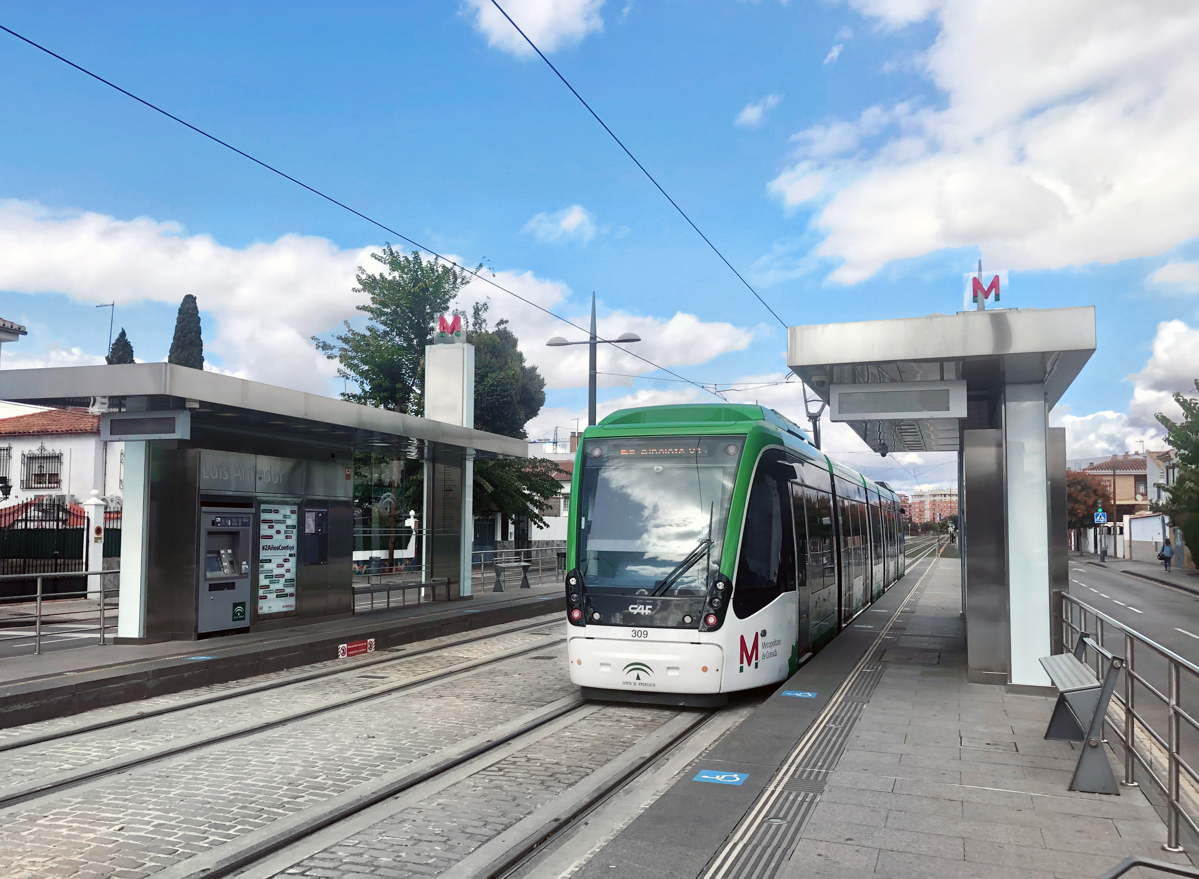 Estación de Luis Amador del Metro de Granada